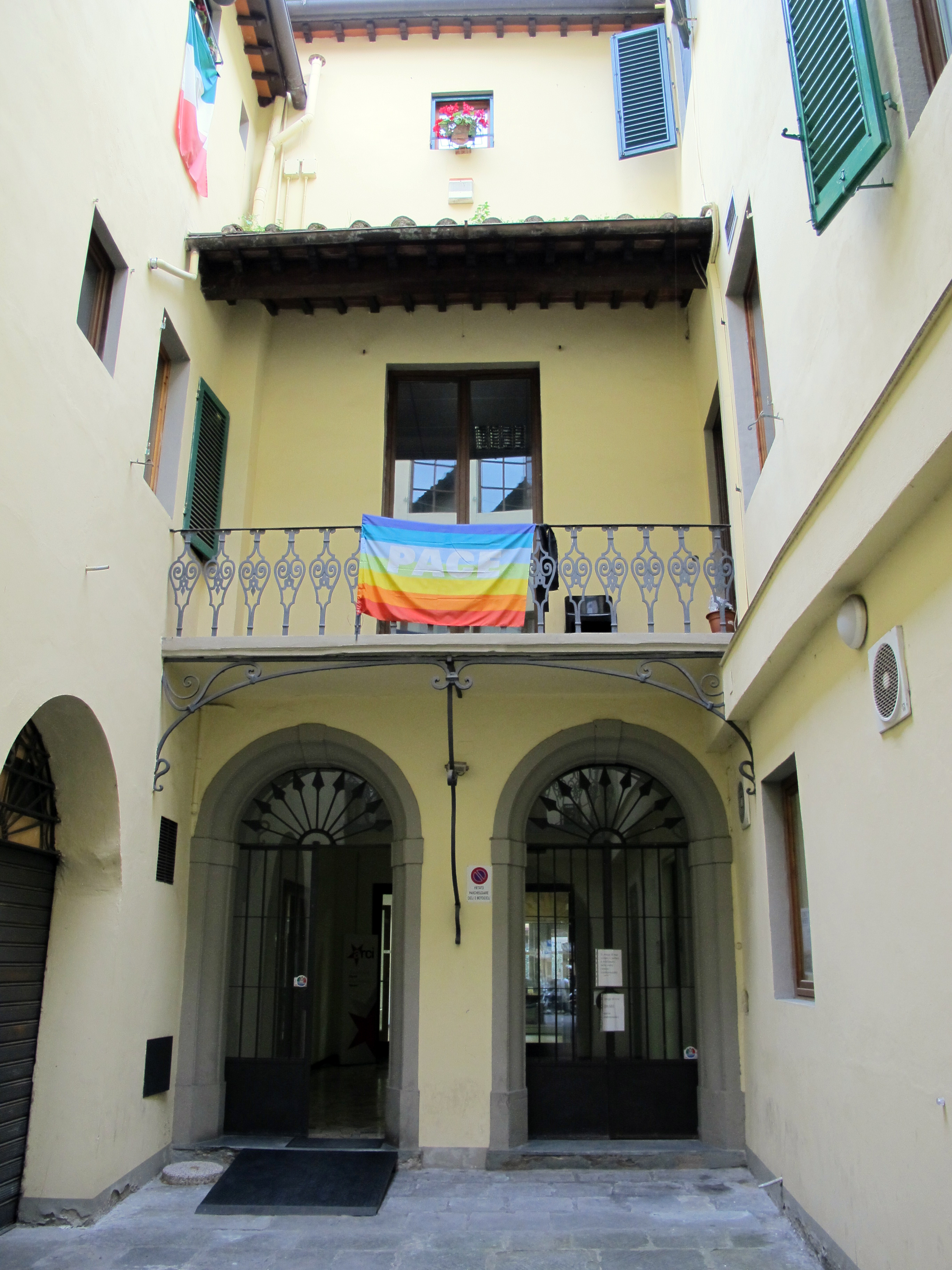 Casa di lorenzo ghiberti, cortile